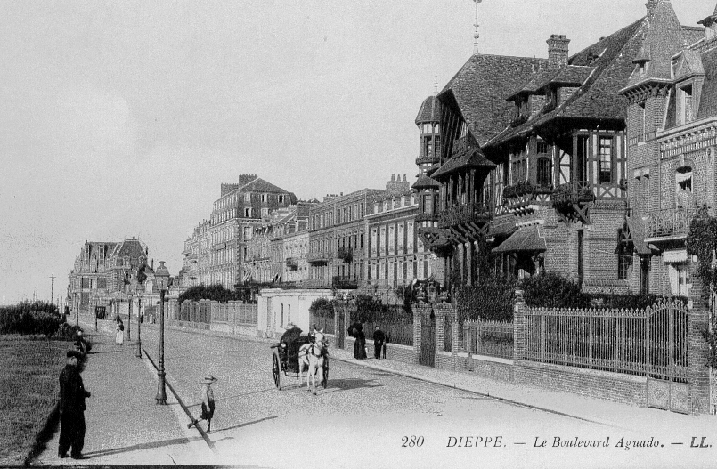 Sujet : Dieppe Année : vers 1905